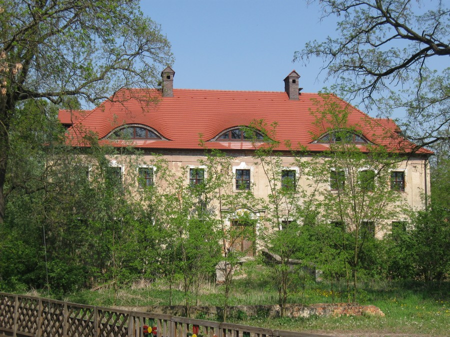 Czciradz - pałac (zabytek nr rejestr. 2149)